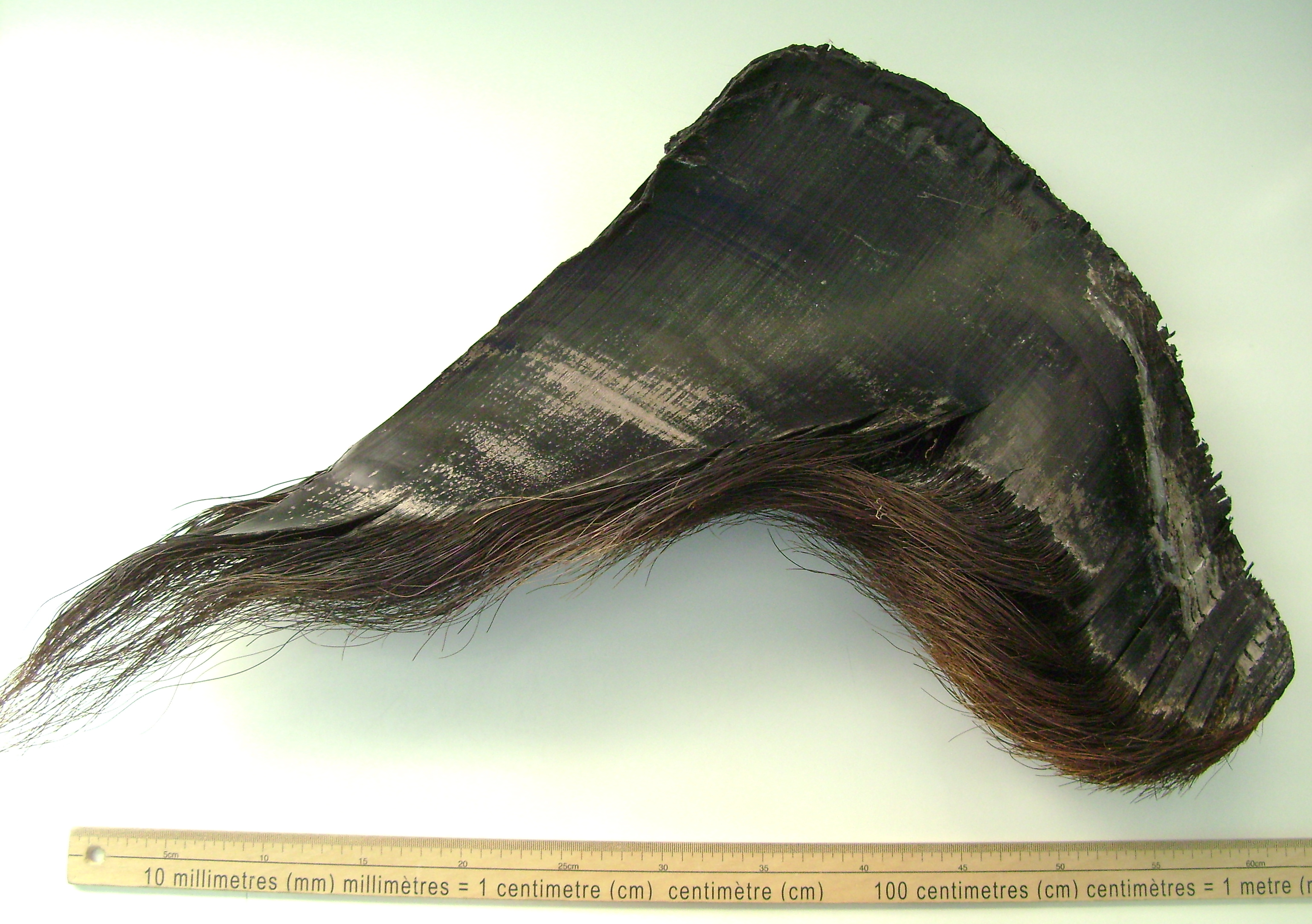 Fanons de rorqual bleu (Balaenoptera musculus)